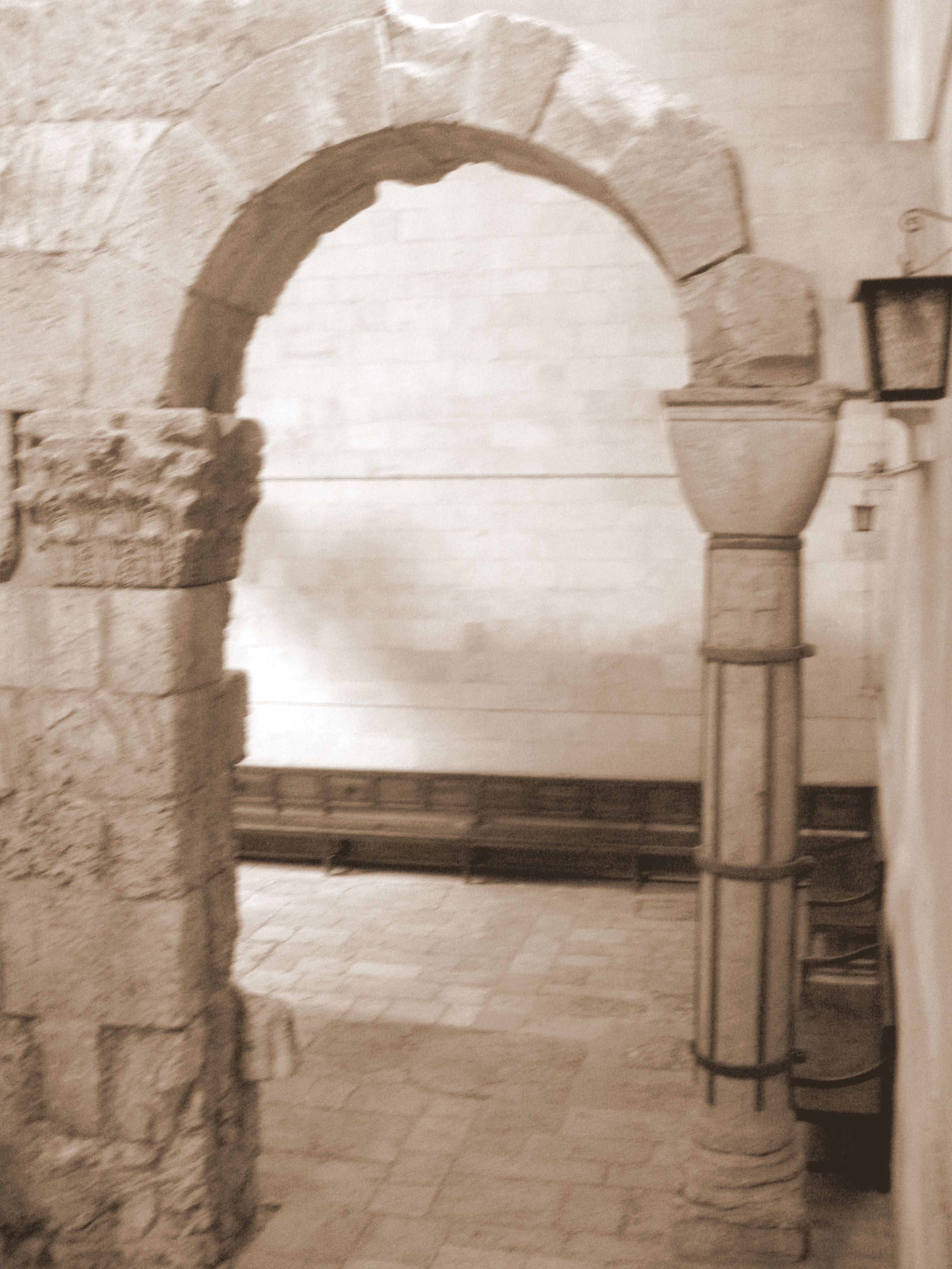 The Christian Quarter - The Russion Church הרובע הנוצרי בעיר העתיקה של ירושלים הכנסייה הרוסית